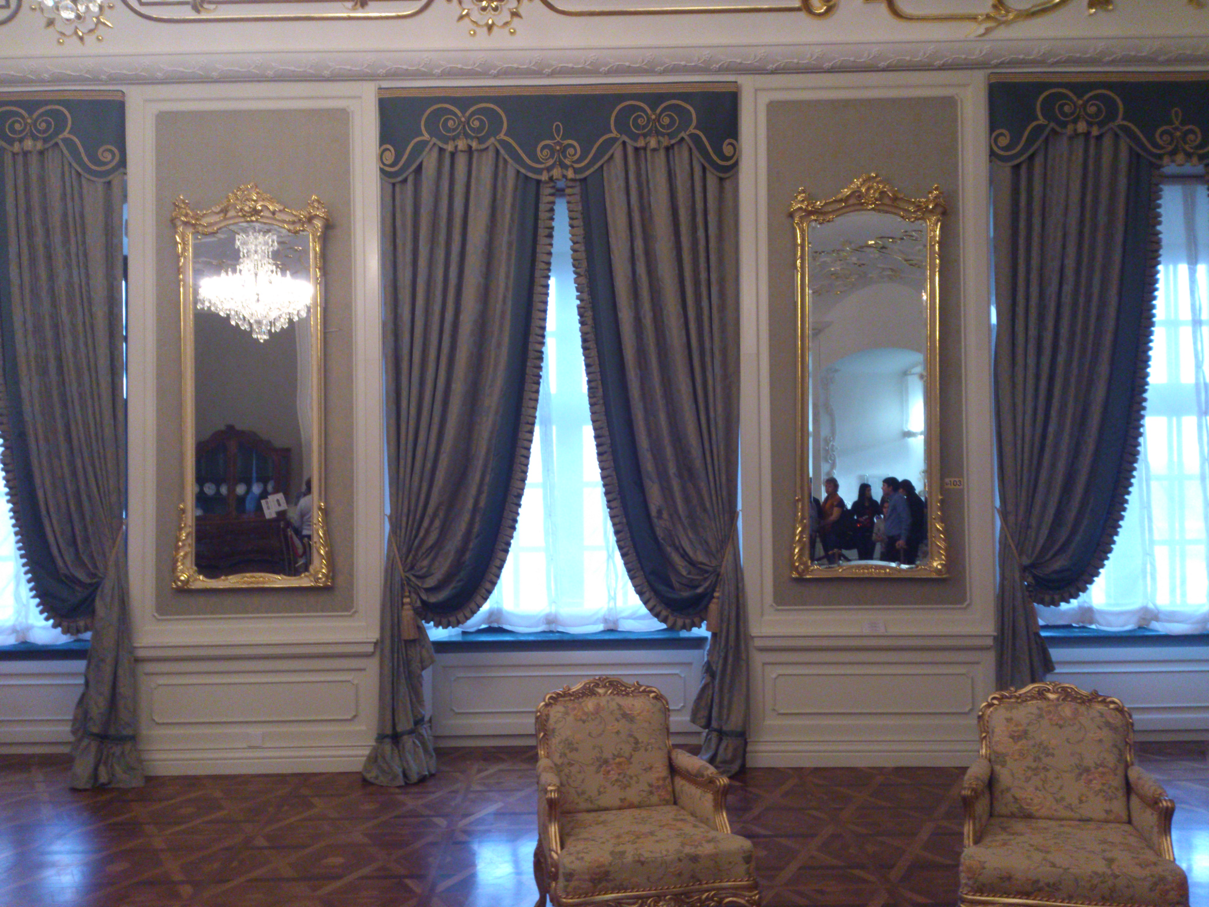 Мирский замок